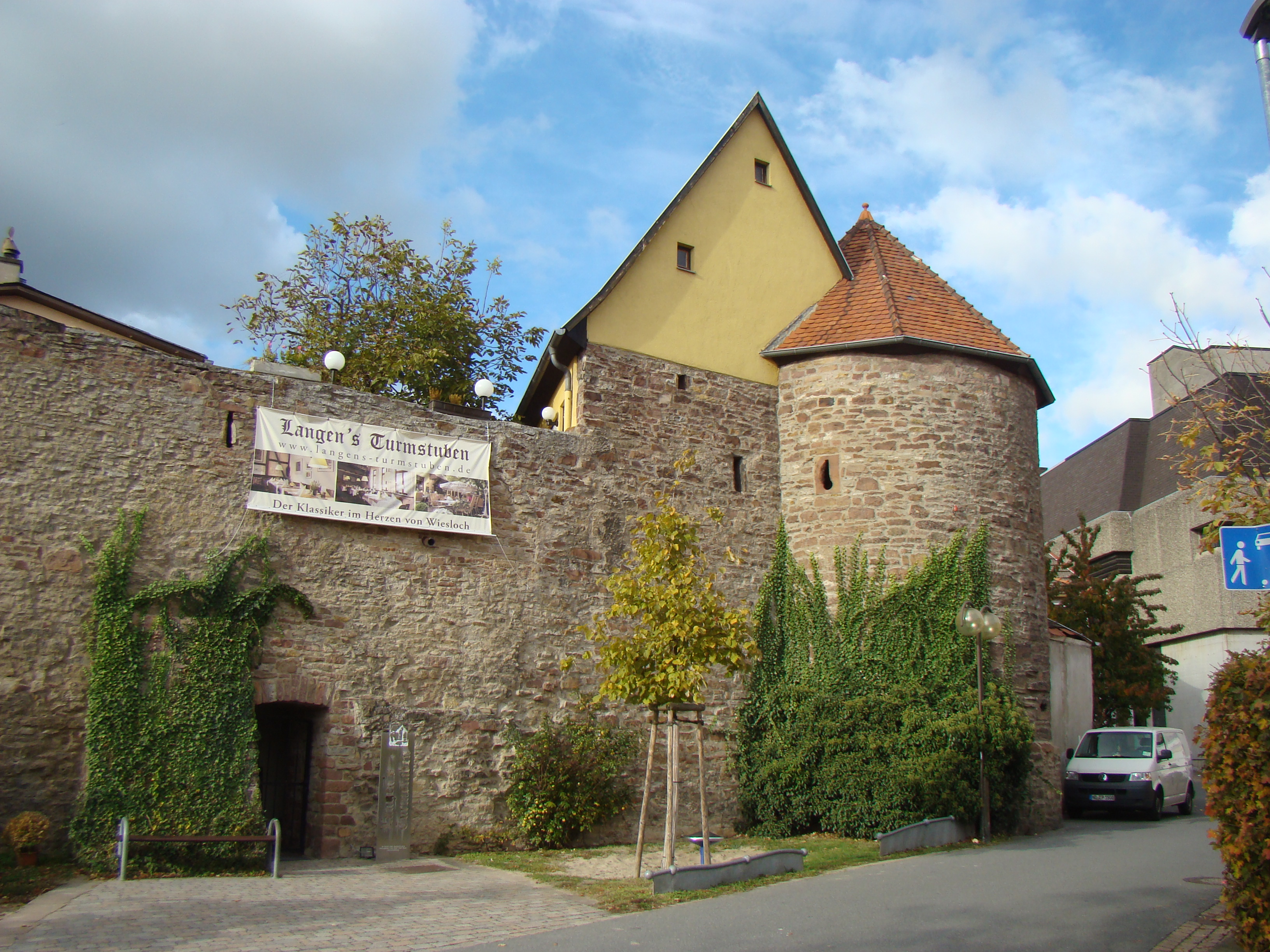 Runder Turm in Wiesloch, mit Stadtmauer